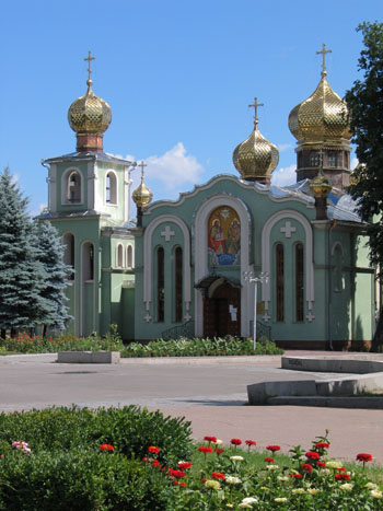 Свято-Троицкий собор в Черкасах